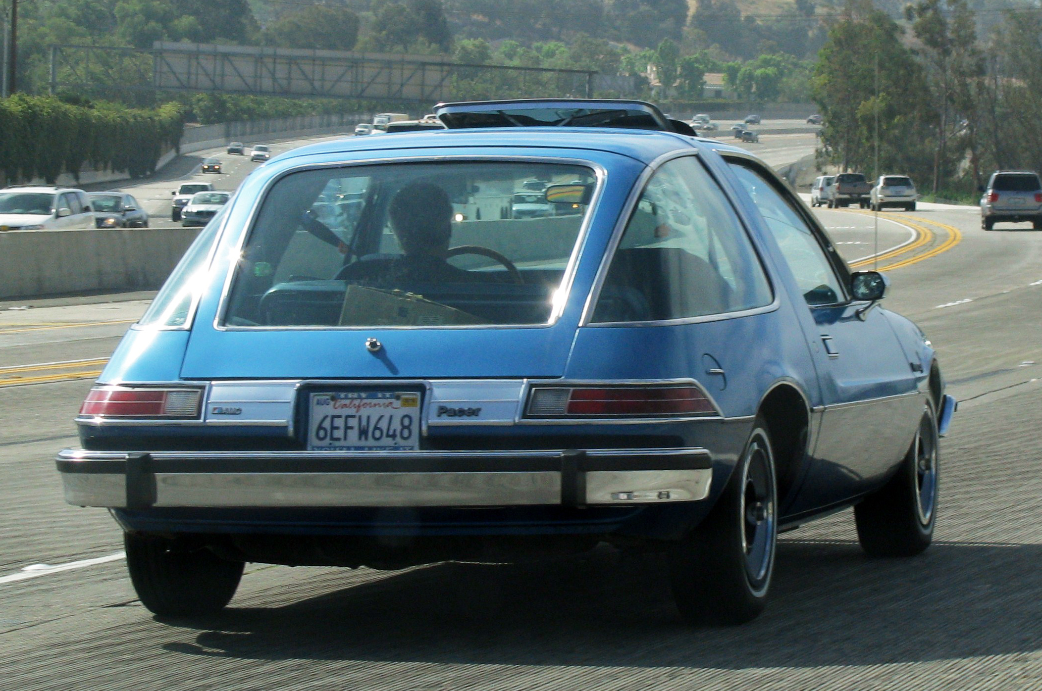 AMC Pacer sur une autoroute de Califormie